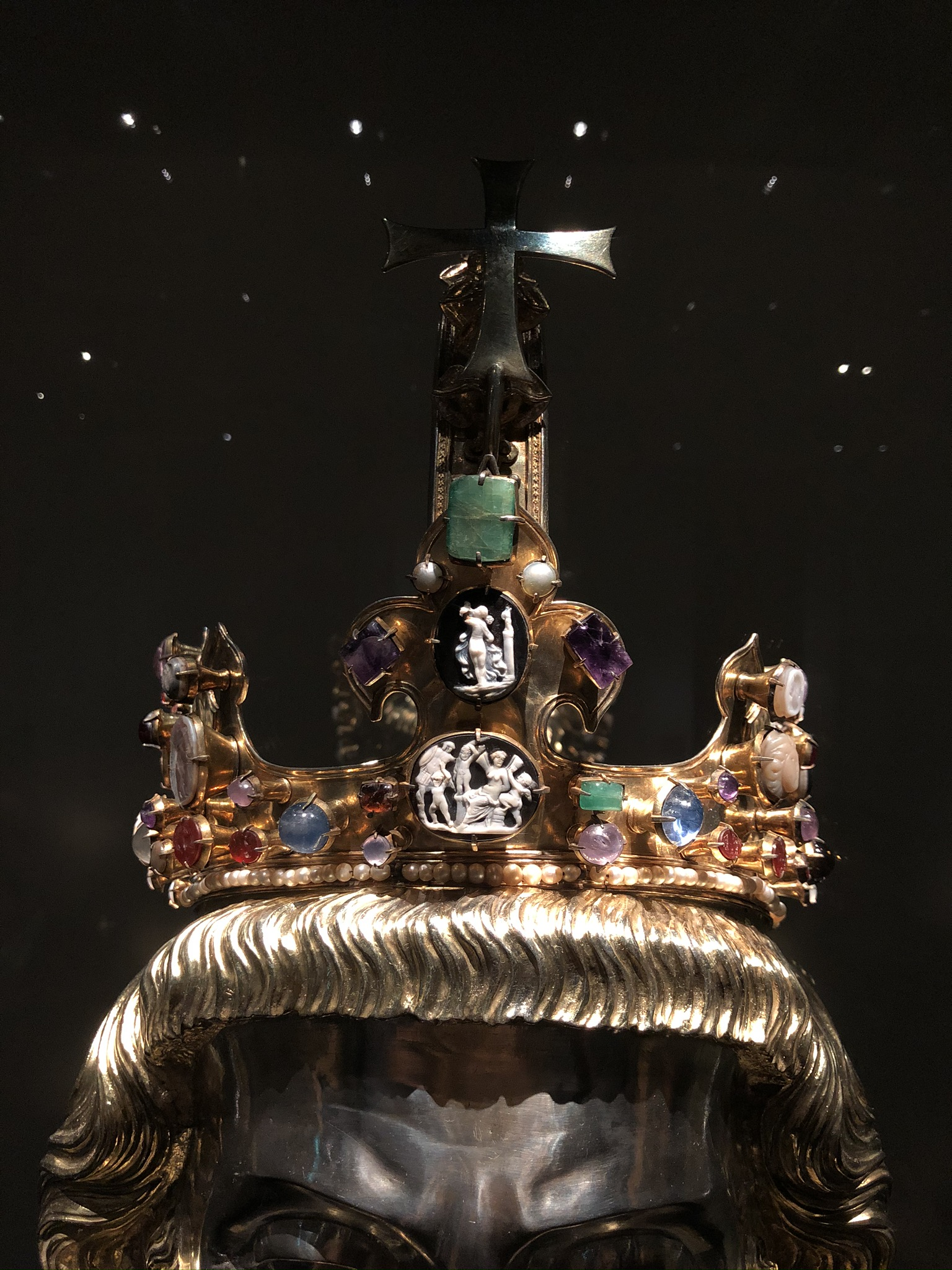 Kameen in der Krone der Karlsbüste. Domschatzkammer Aachen, Deutschland